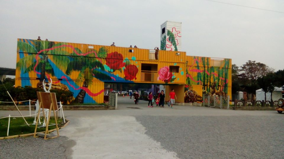 台27線屏東交流道旁 位處長治、九如及屏東市的交界處